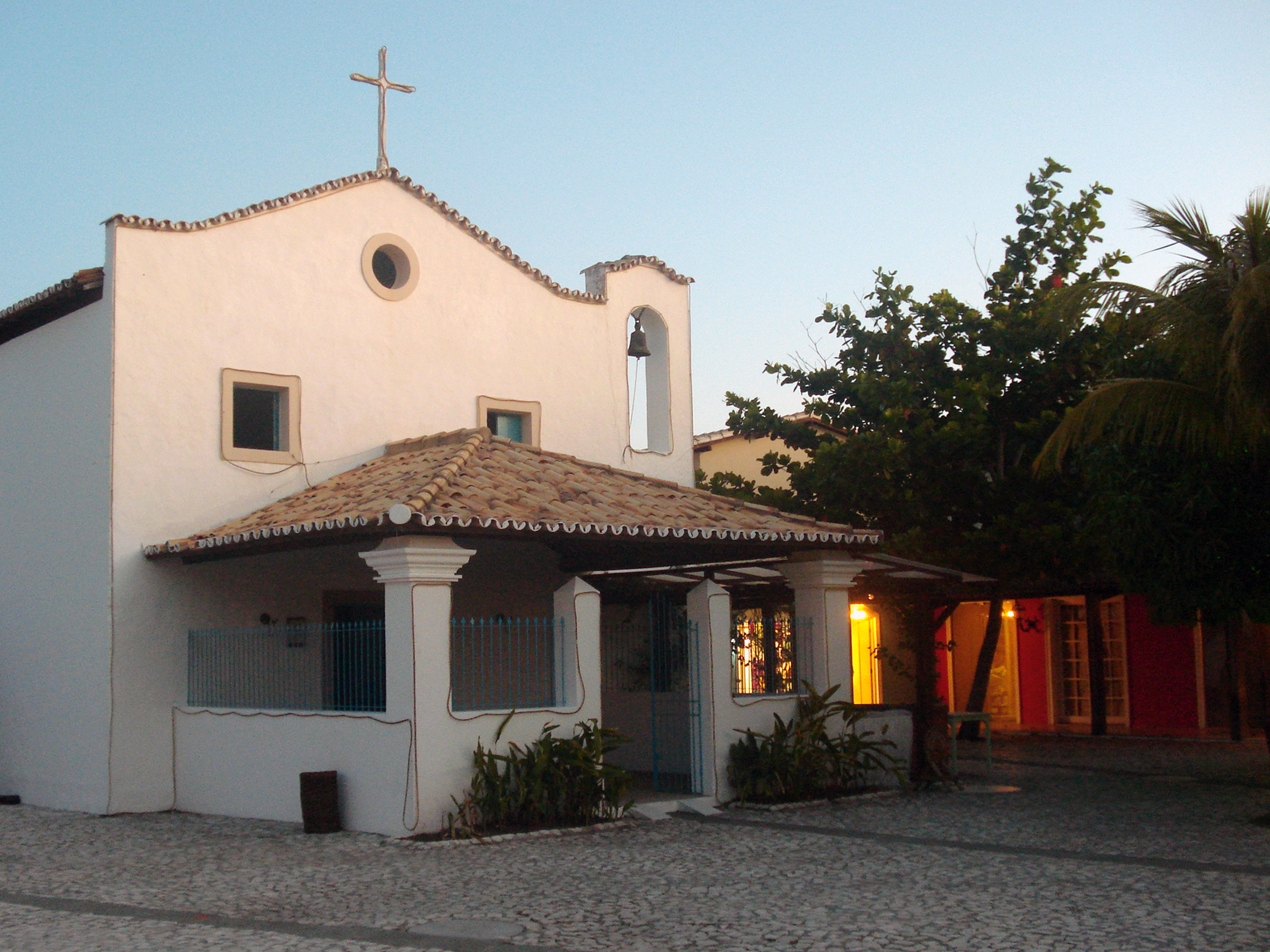 Capilla en Vila Nova da Praia, Costa do Sauípe, Bahía, Brasil.